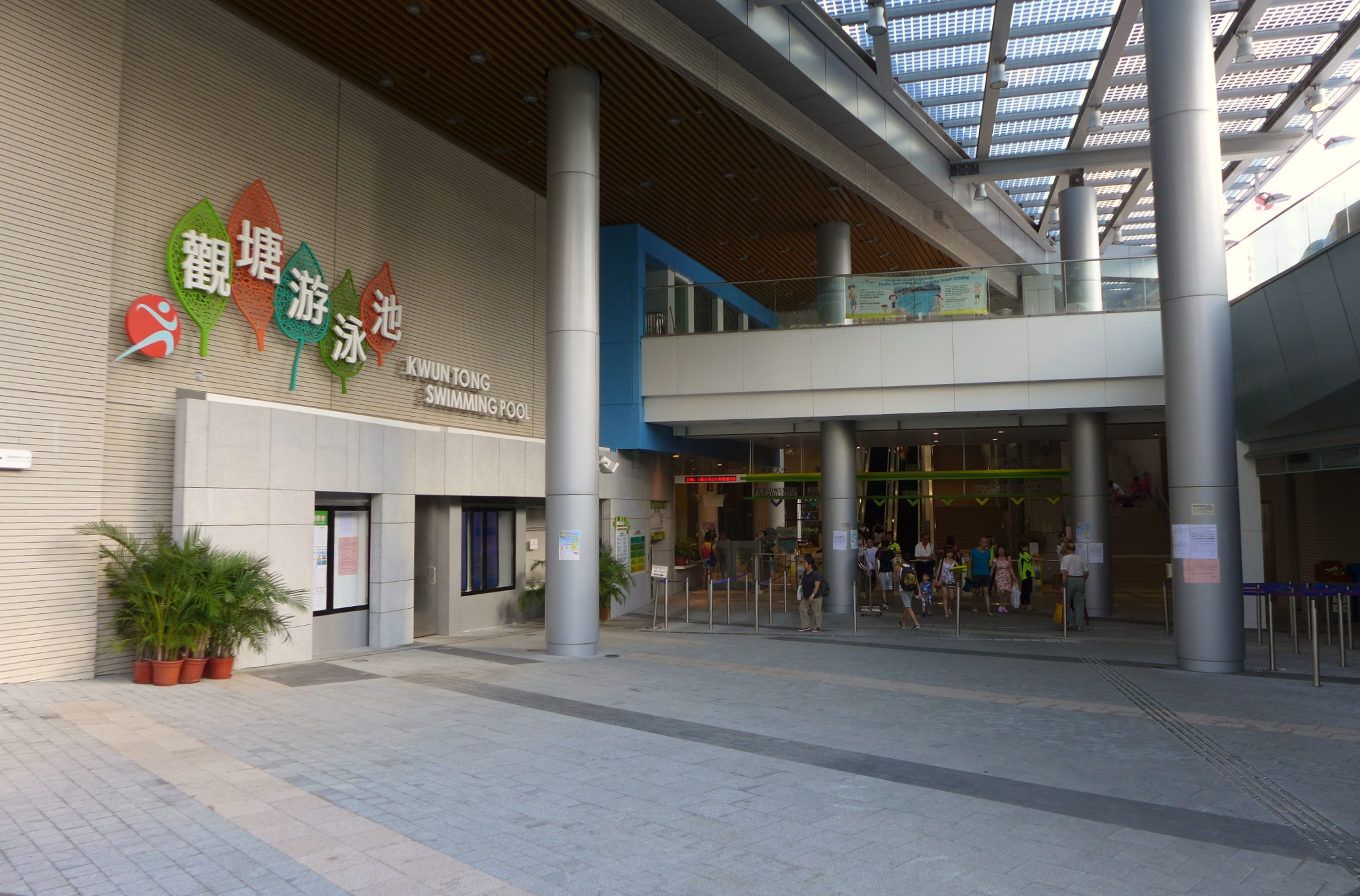 Kwun Tong Swimming Pool